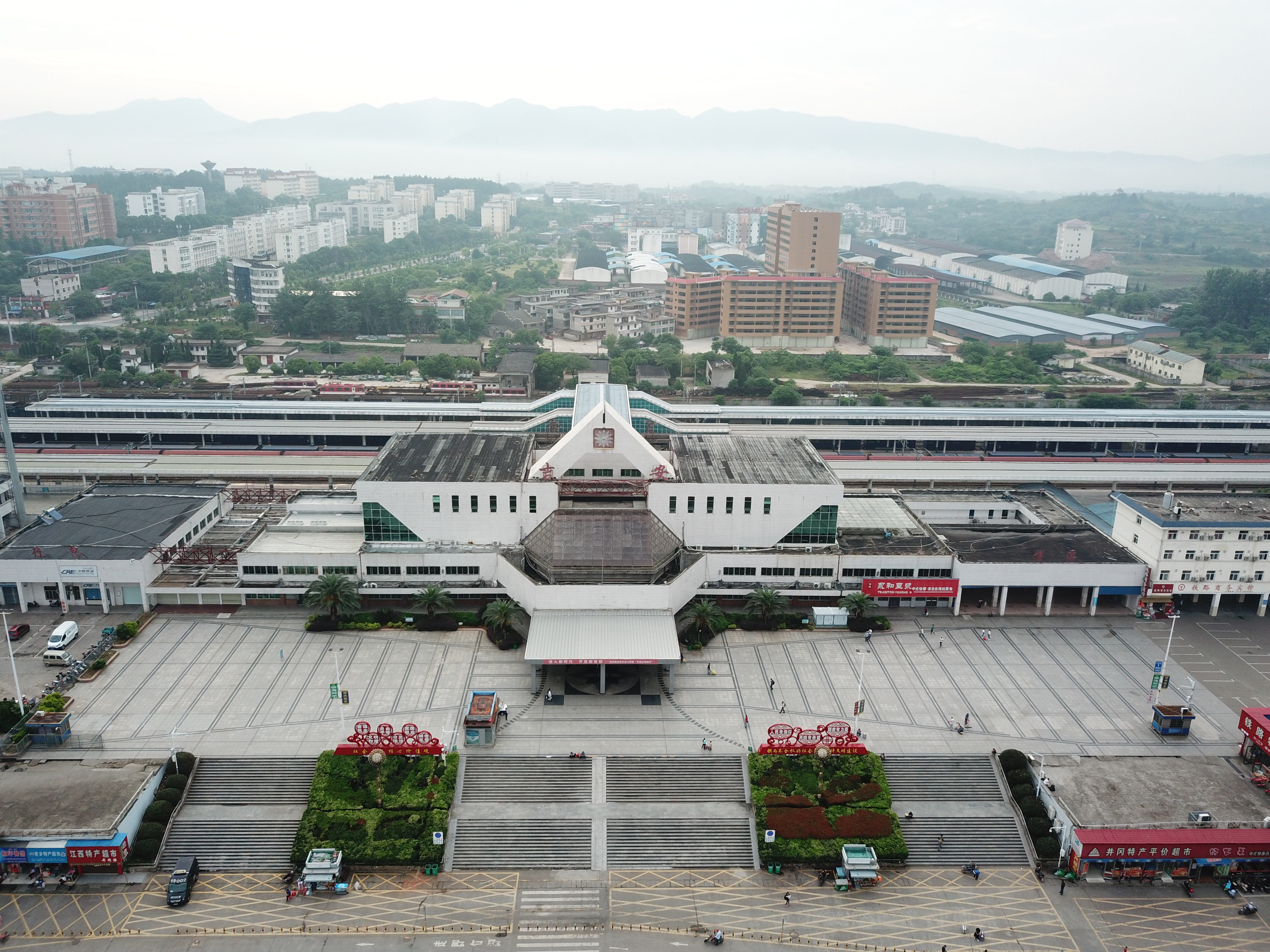 吉安站